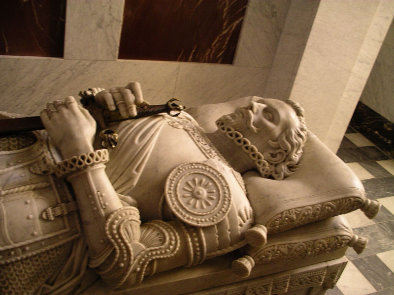 Sepulcro de don Juan de Austria († 1578), que era hijo ilegítimo del emperador Carlos I de España, en el Panteón de Infantes del monasterio de El Escorial, (España).